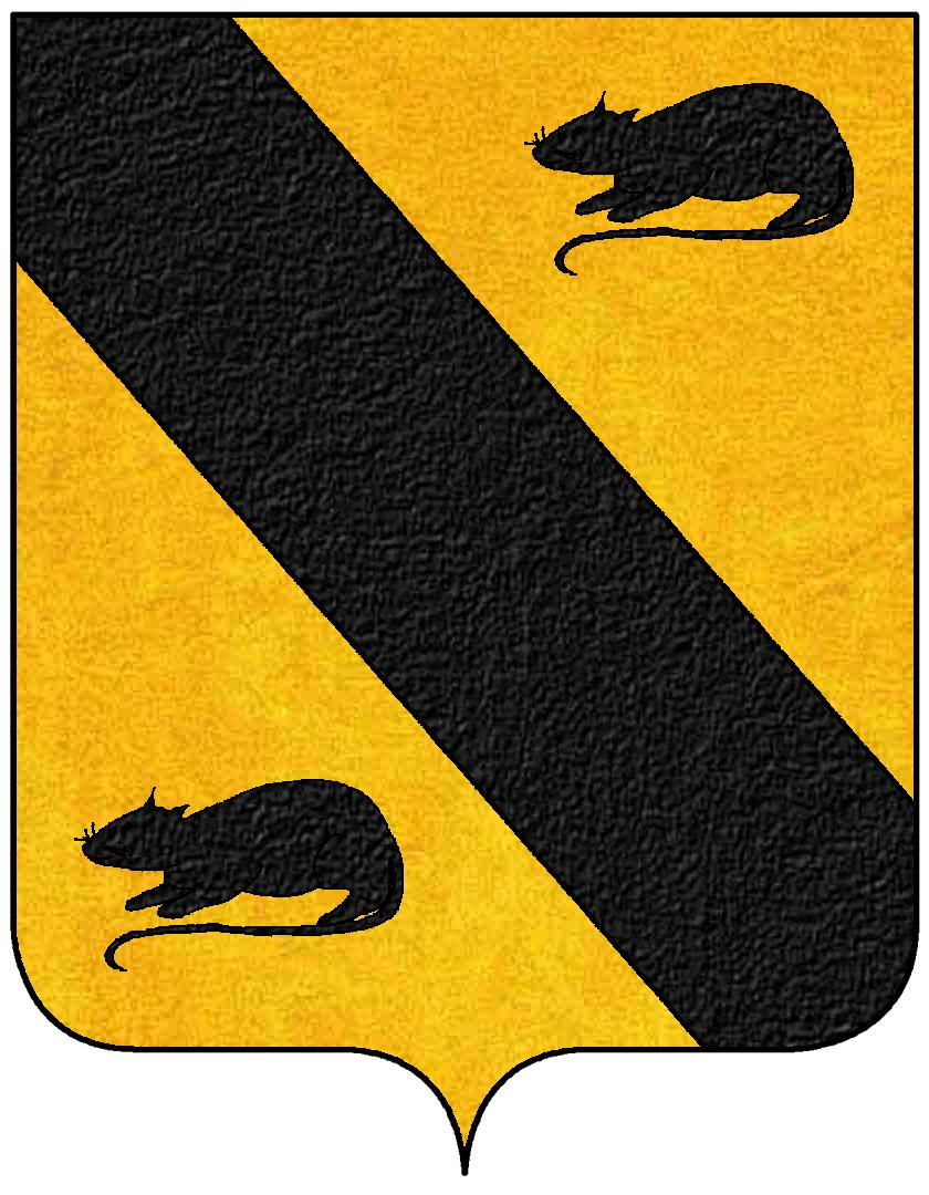 Stemma della contrada dei Morigi